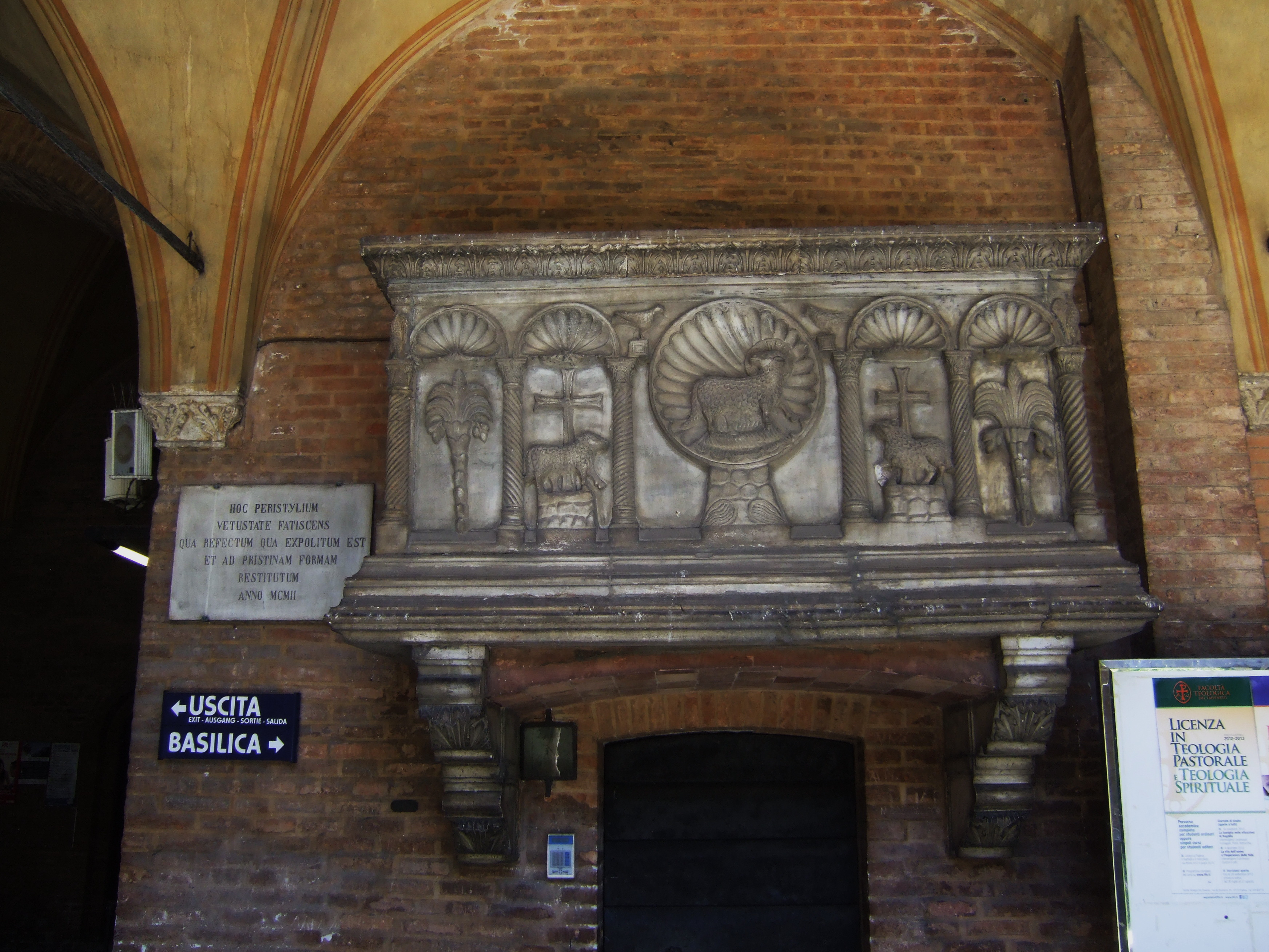 Padova - Sant'Antonio - Sarcofago della famiglia Bebi